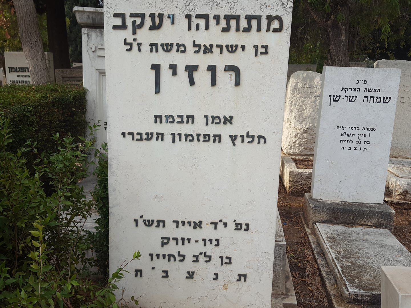 קברו של השחקן והזמר מתתיהו יעקב רוזין בבית העלמין בנחלת יצחק ][צילום אלי אלון